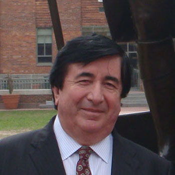 Washington, USA. Marzo 16 de 2011. El Jefe de Gobierno de la Ciudad de Bs. As., Mauricio Macri hoy en la George Washington University, donde participo del XXII Seminario de estrategias de campañas electorales en The Graduate School of Political Management, con sus asesores Jaime Duran Barba y Santiago Nieto.-Foto GCBA.